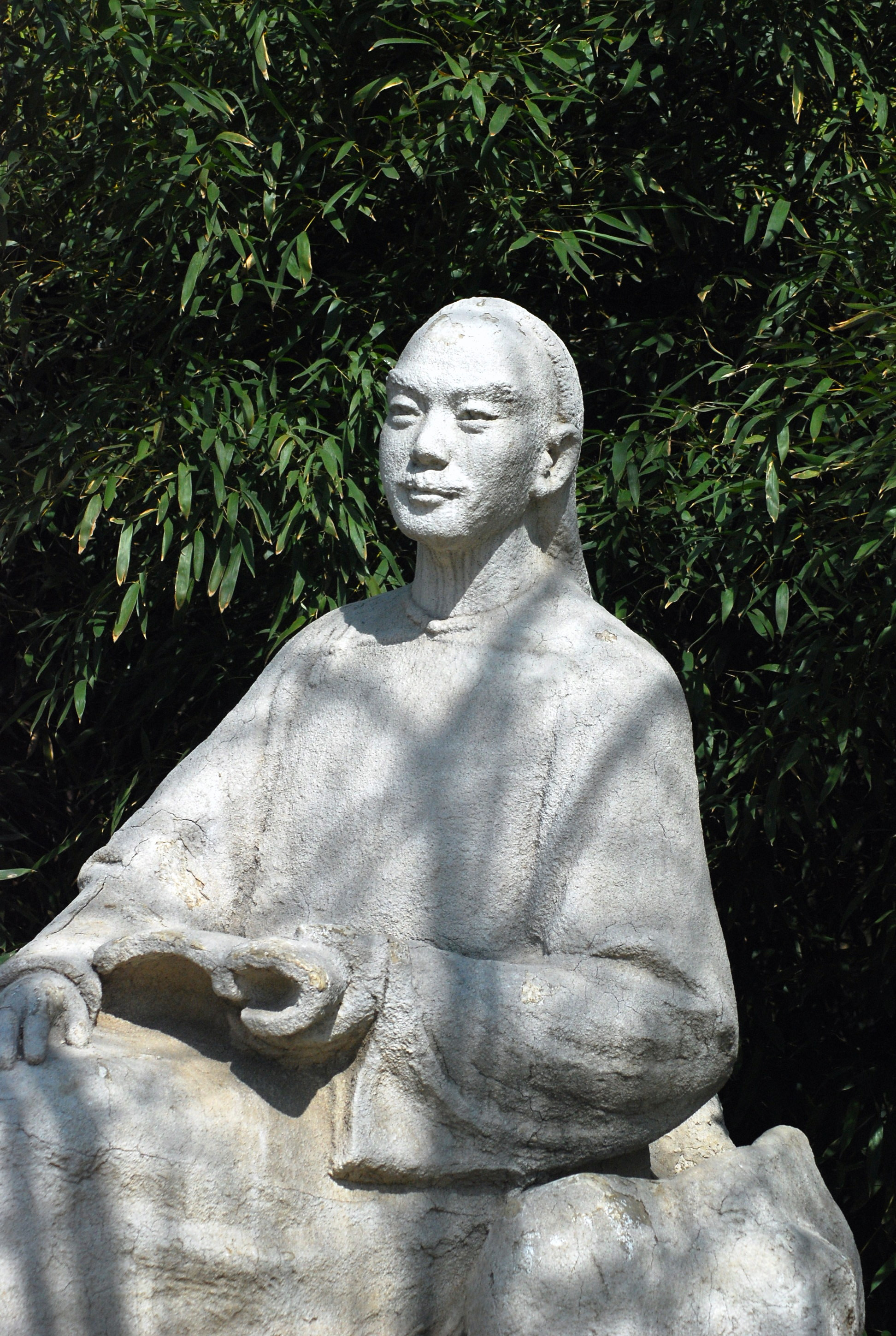 北京植物园黄叶村曹雪芹纪念馆处的曹雪芹塑像